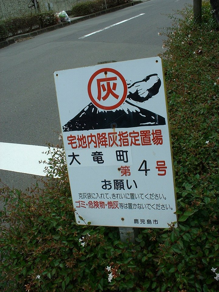 桜島火山灰の置場 鹿児島市内